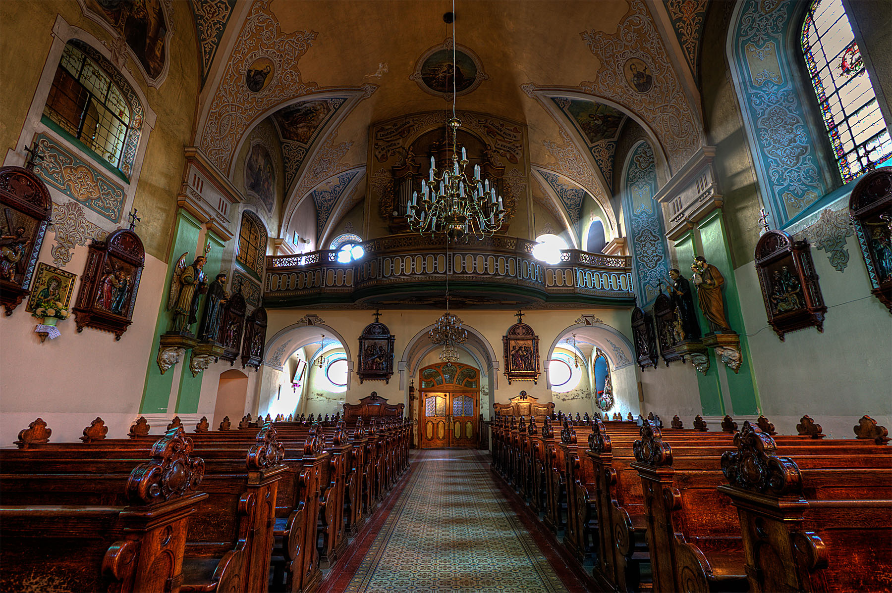 Wnętrze kościoła Piotra i Pawła w Prudniku.